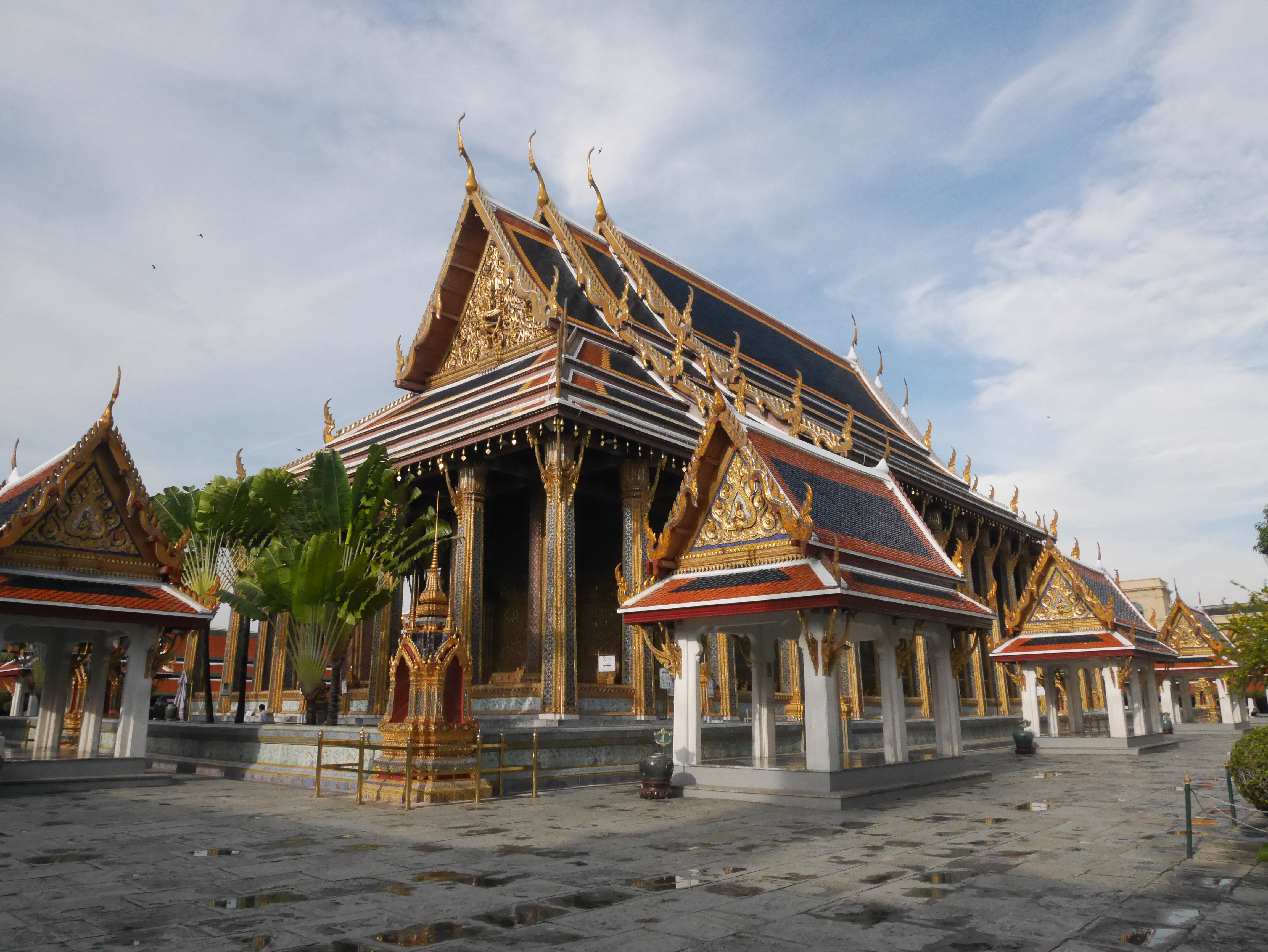 พระบรมมหาราชวังและวัดพระศรีรัตนศาสดาราม เจ้าของบัญชี กสิณธร ราชโอรส เป็นเจ้าของบัญชีเดียวกับ บัญชี Phonlakrit Sunthornphon ของ Facebook บัญชี Tsutomu RIkimi ของ Google และ Panoramio .com บัญชี ซูบารุโยของ กสิณธร ราชโอรส same account holder of Facebook (Phonlakrit Sunthornphon),Google and (Tsutomu RIkimi) and ซูบารุโย at